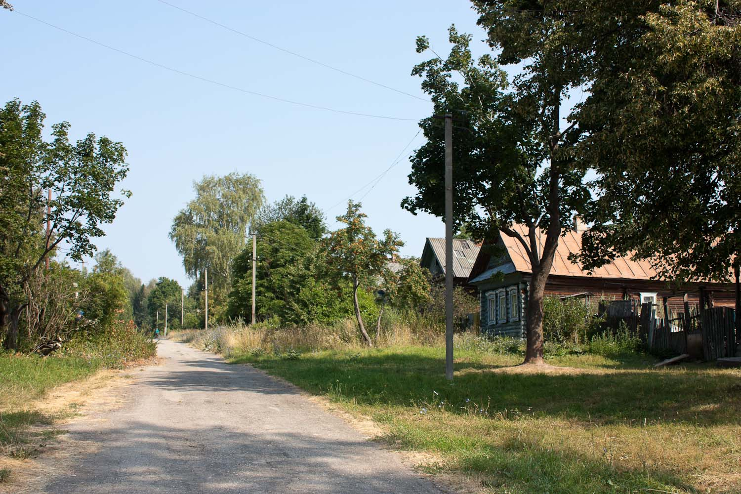 д.Тарханово (2010.07.24)